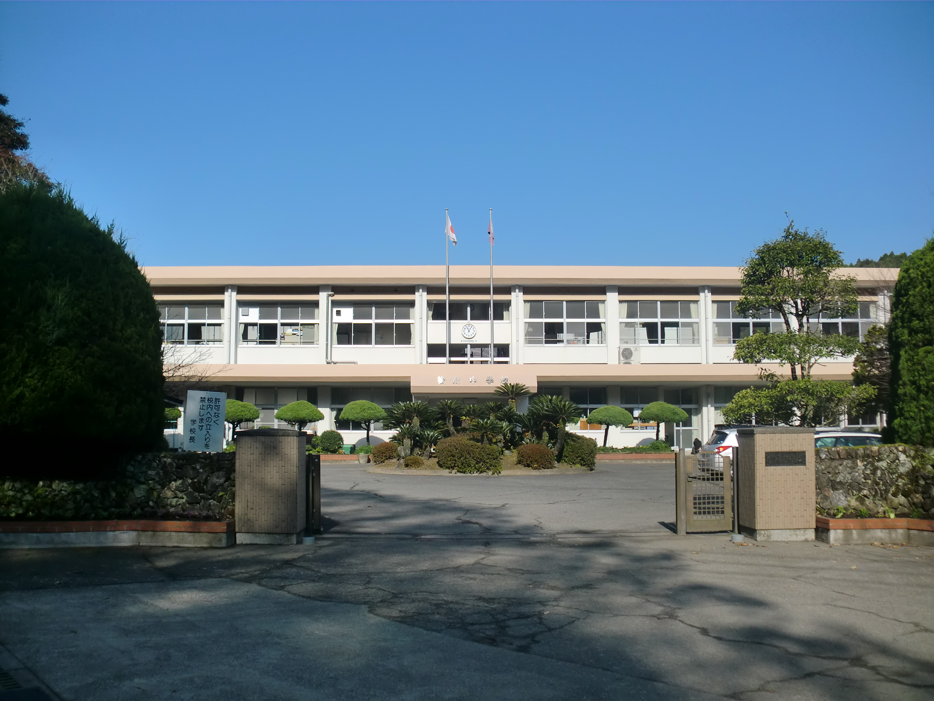 霧島市にある霧島市立横川中学校